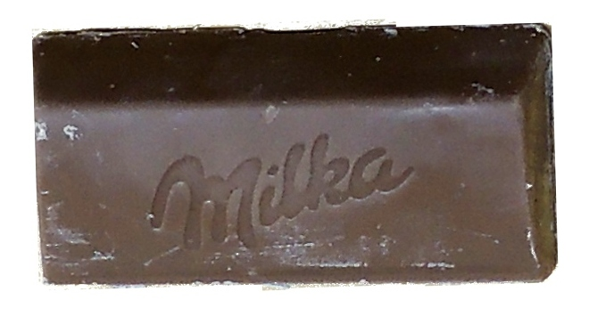 Barra de chocolate Milka almendrado